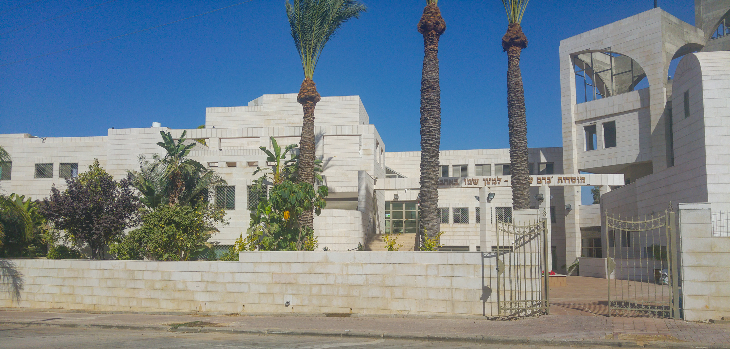 ישיבתו של הרב מוסדות כרם שלמה למען שמו באהבה